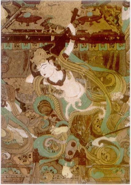 中文（中国大陆）: 敦煌莫高窟112窟的壁画《伎乐图》，创作于公元1世纪左右